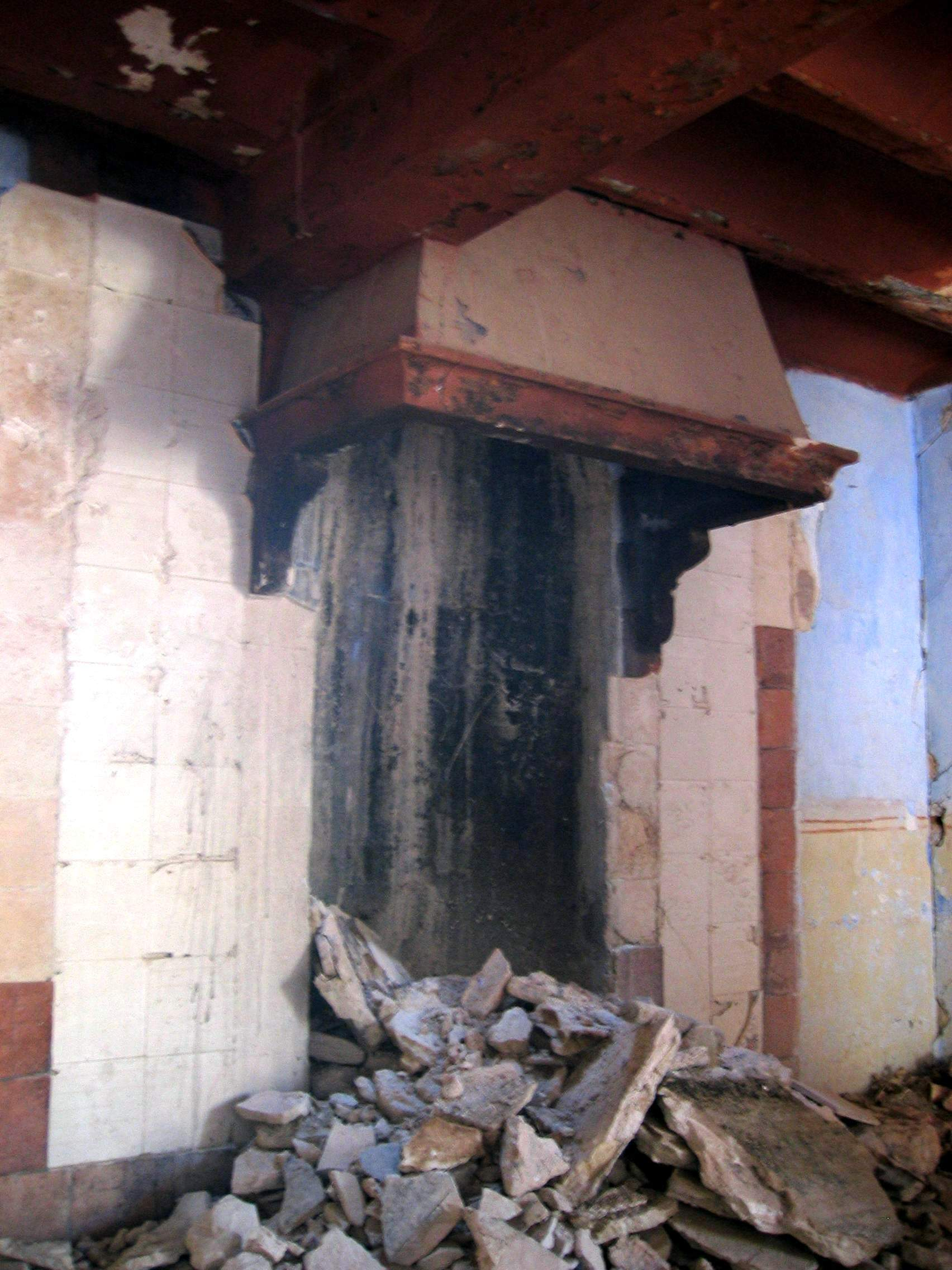 Detalle de chimena de fuego bajo arruinada en una casa de La Balsa, Ademuz